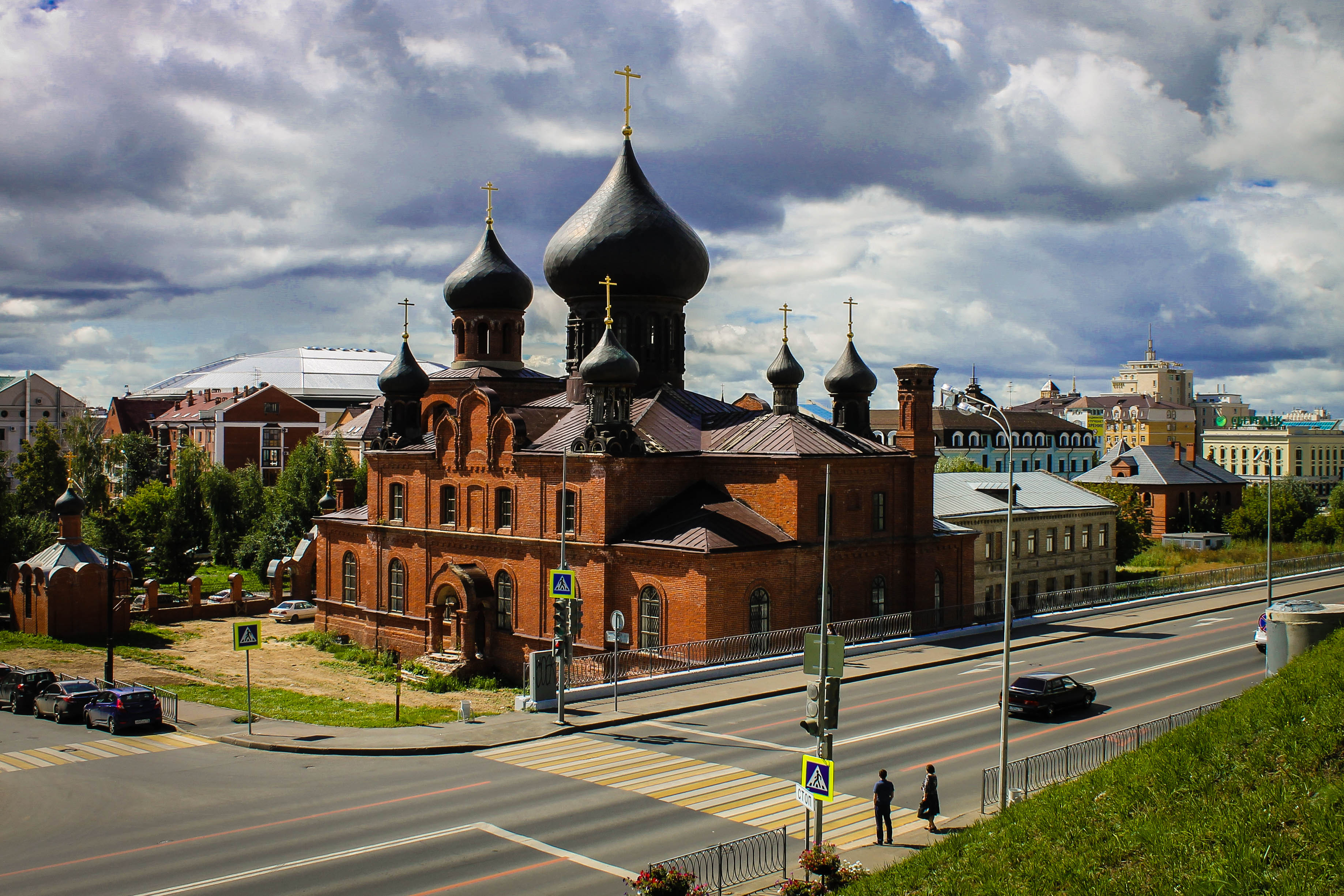 Церковь старообрядческая: улица Ульяновых, 11, Казань, Татарстан